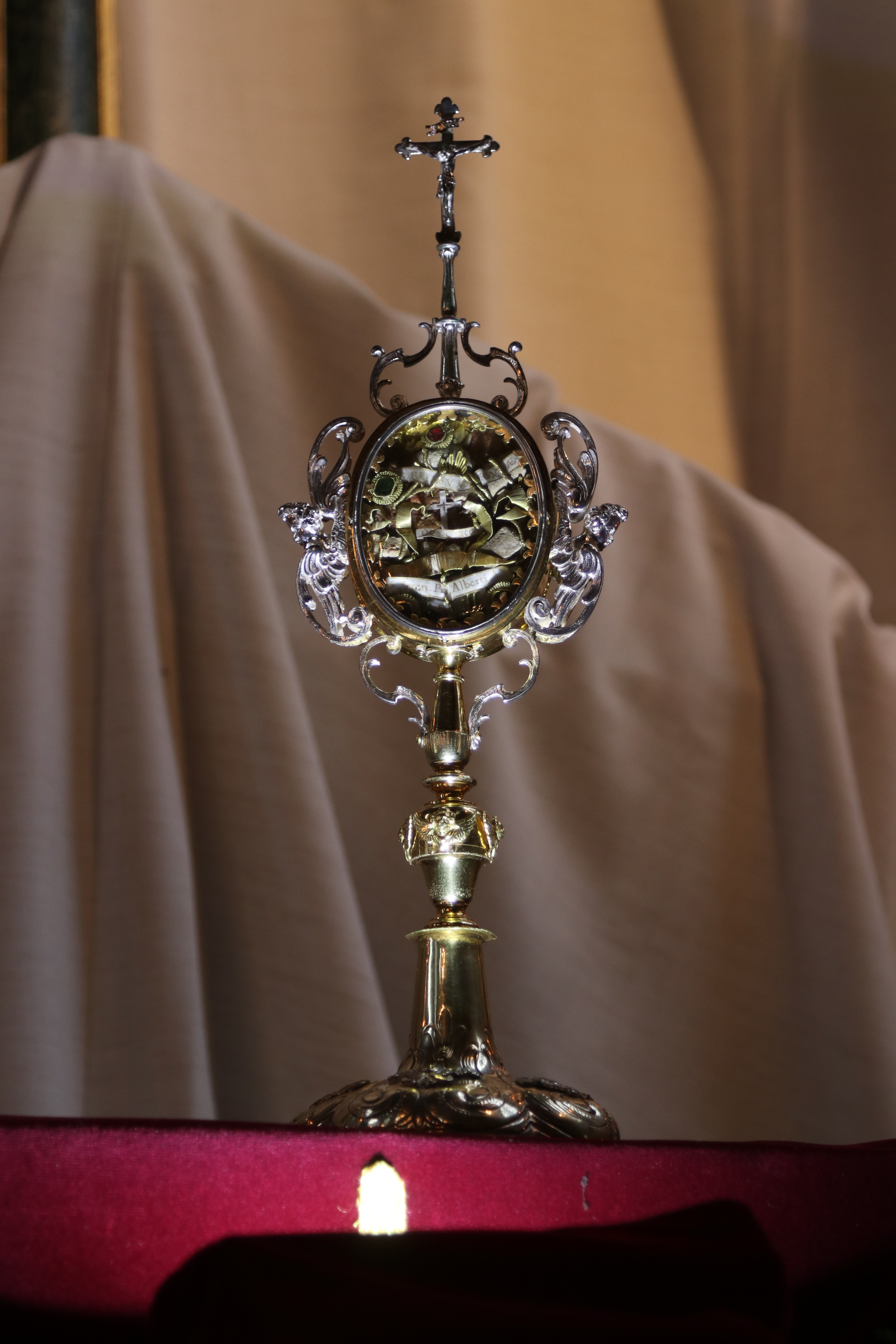 Reliquar mit Kreuzpartikel in St. Maria Thalkirchen, München. Präsentation zum Frauendreißiger 2018